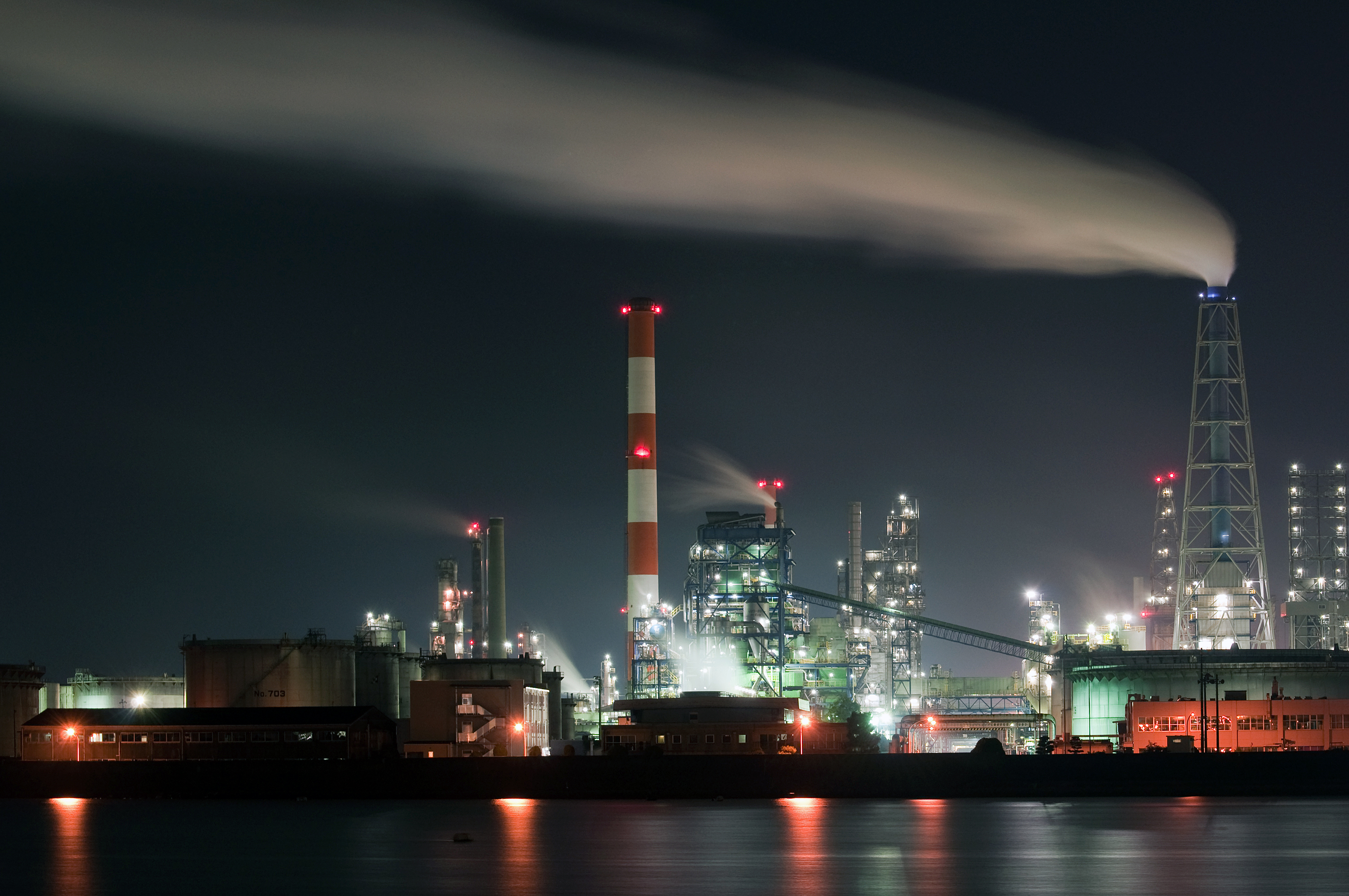 新日本石油（山口）